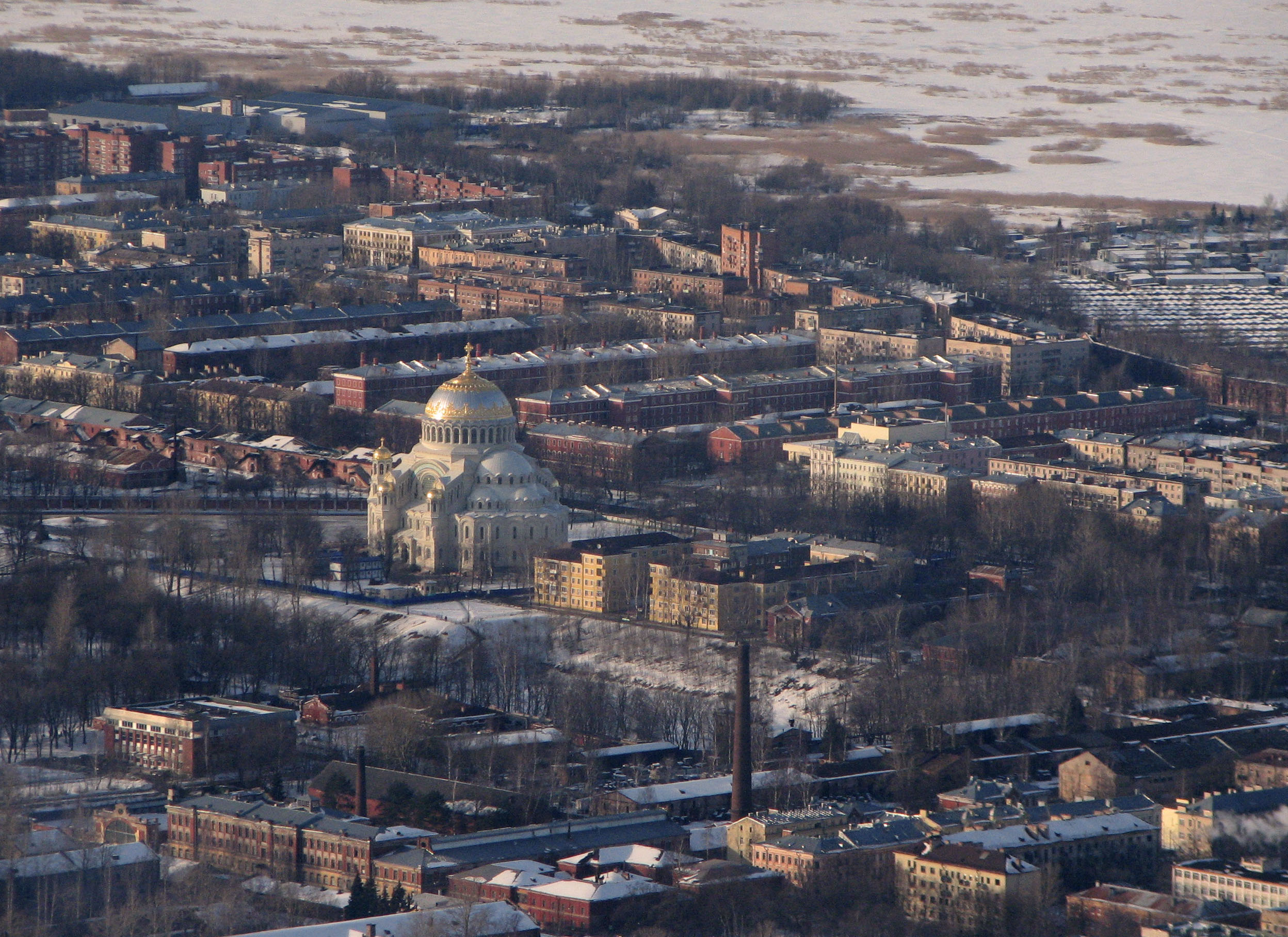 Собор Никольский Морской (Санкт-Петербург и Лен.область, Кронштадт, Якорная площадь, 5)